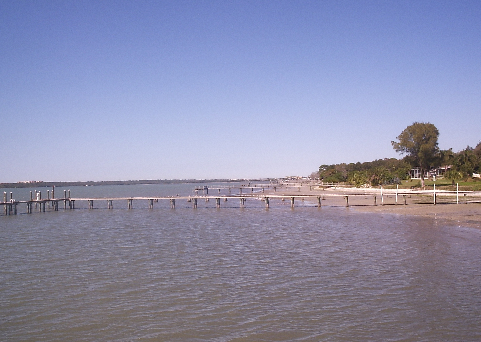 Jungle Prada/de Navaraez Park. St. Petersburg, Florida